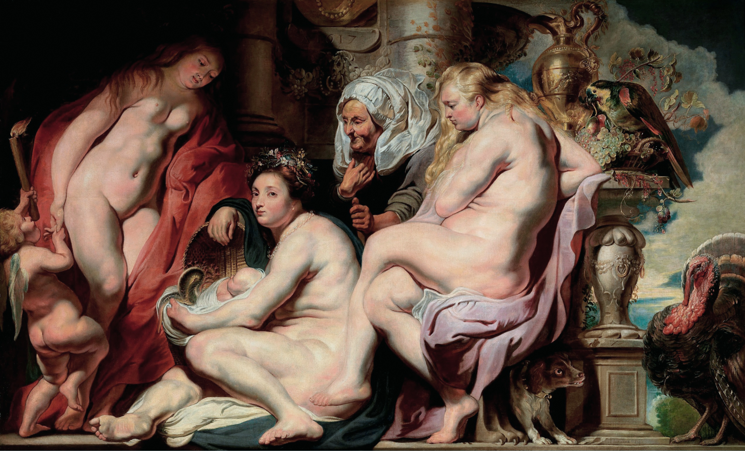 Les Filles de Cécrops découvrant l'enfant ÉrichthoniosThe Daughters of Cecrops Finding the Child Erichthoniustitle QS:P1476,fr:"Les Filles de Cécrops découvrant l'enfant Érichthonios" label QS:Lfr,"Les Filles de Cécrops découvrant l'enfant Érichthonios"